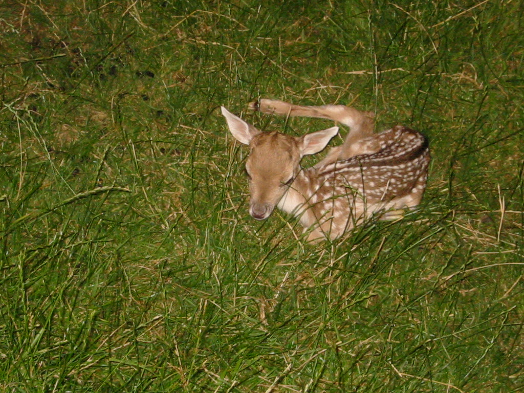 Dama dama